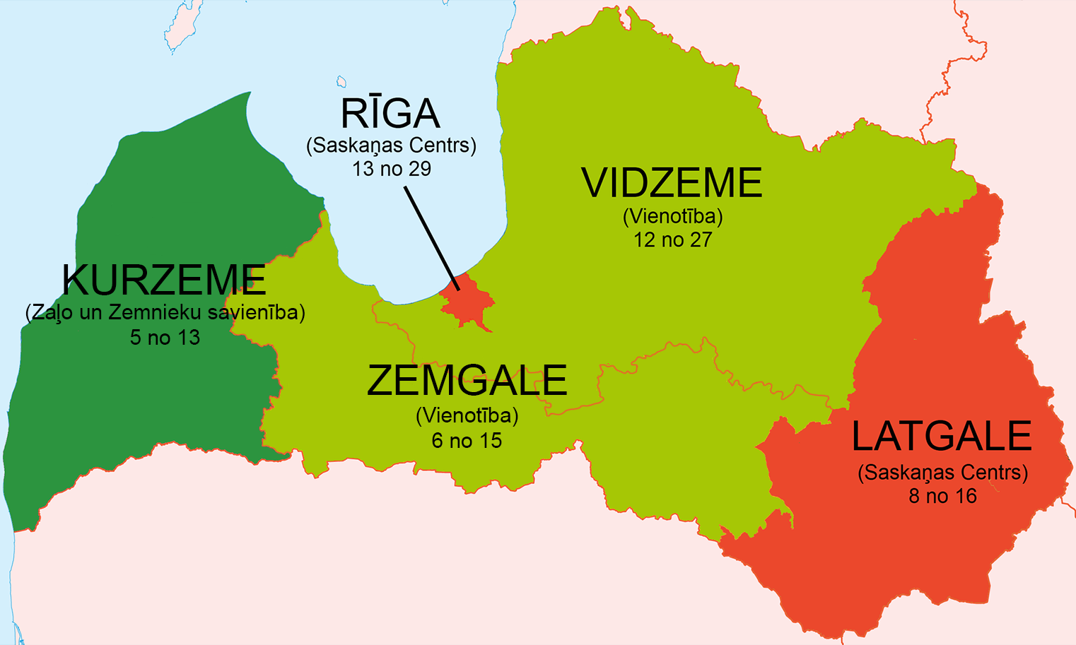 10. Saeimas vēlēšanu uzvarētāji apgabalos. Sarkans: Saskaņas centrs. Gaiši zaļš: Vienotība. Tumši zaļš: Zaļo un Zemnieku savienība.)